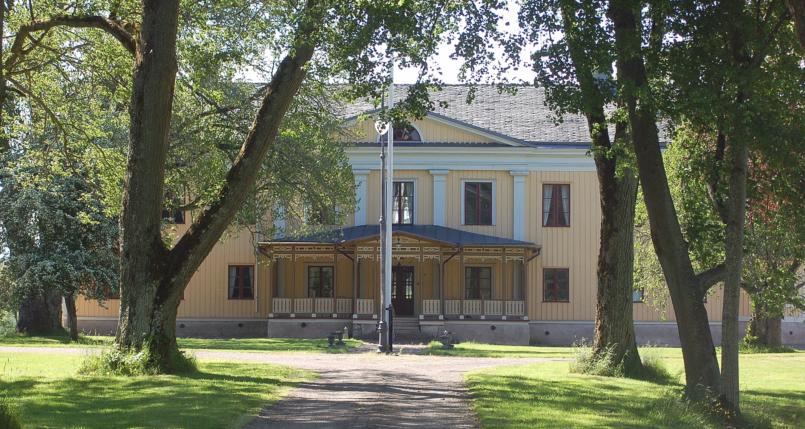 Ribbingsfors herrgård, Gullspång.